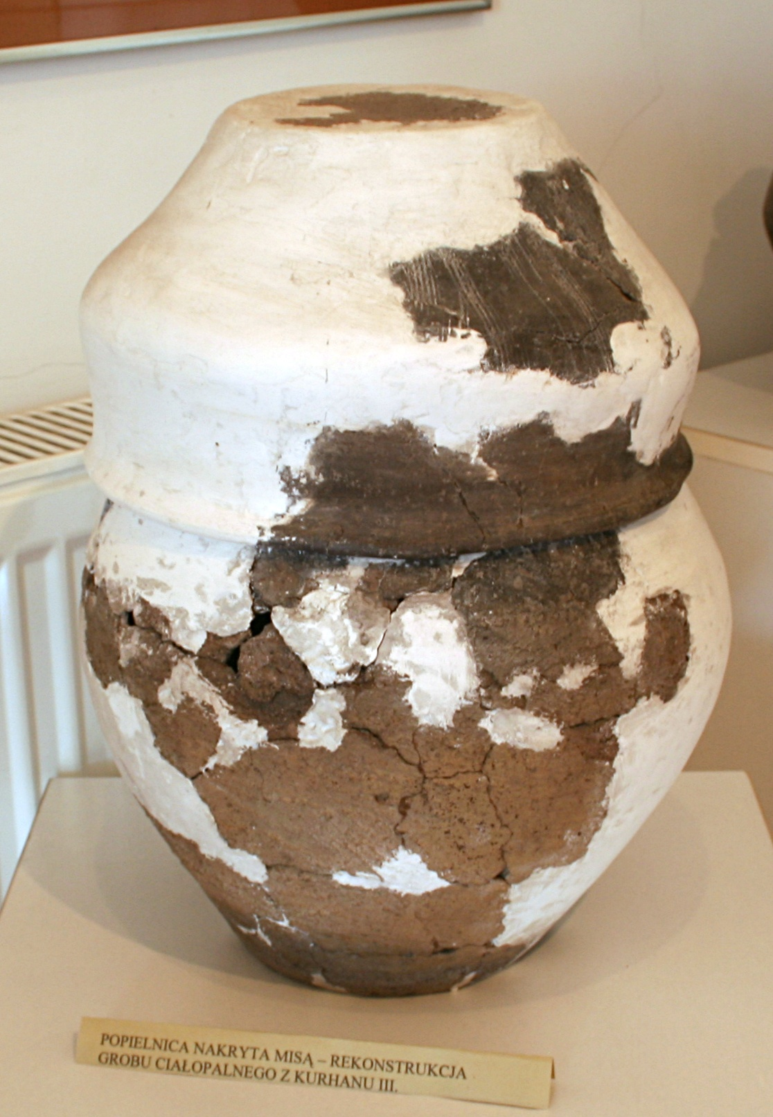 Popielnica w muzeum w Odrach (oddział muzeum historyczno-etnograficznego w Chojnicach)